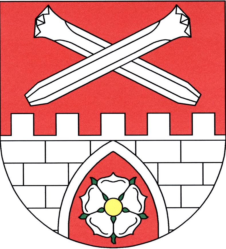 Znak obce Dolní Město